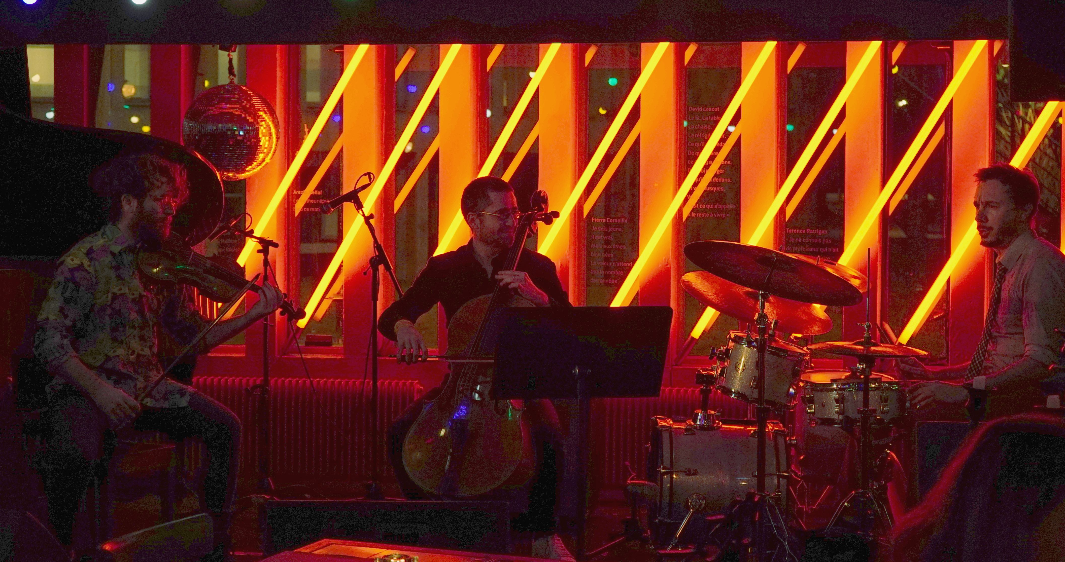 le trio Ceccaldi Darrifourcq en concert à la COmédie de Reims.